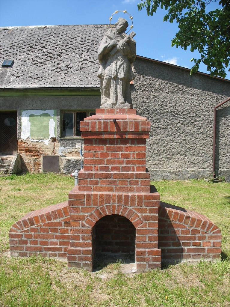 Socha svatého Jana Nepomuckého, při čp. 111